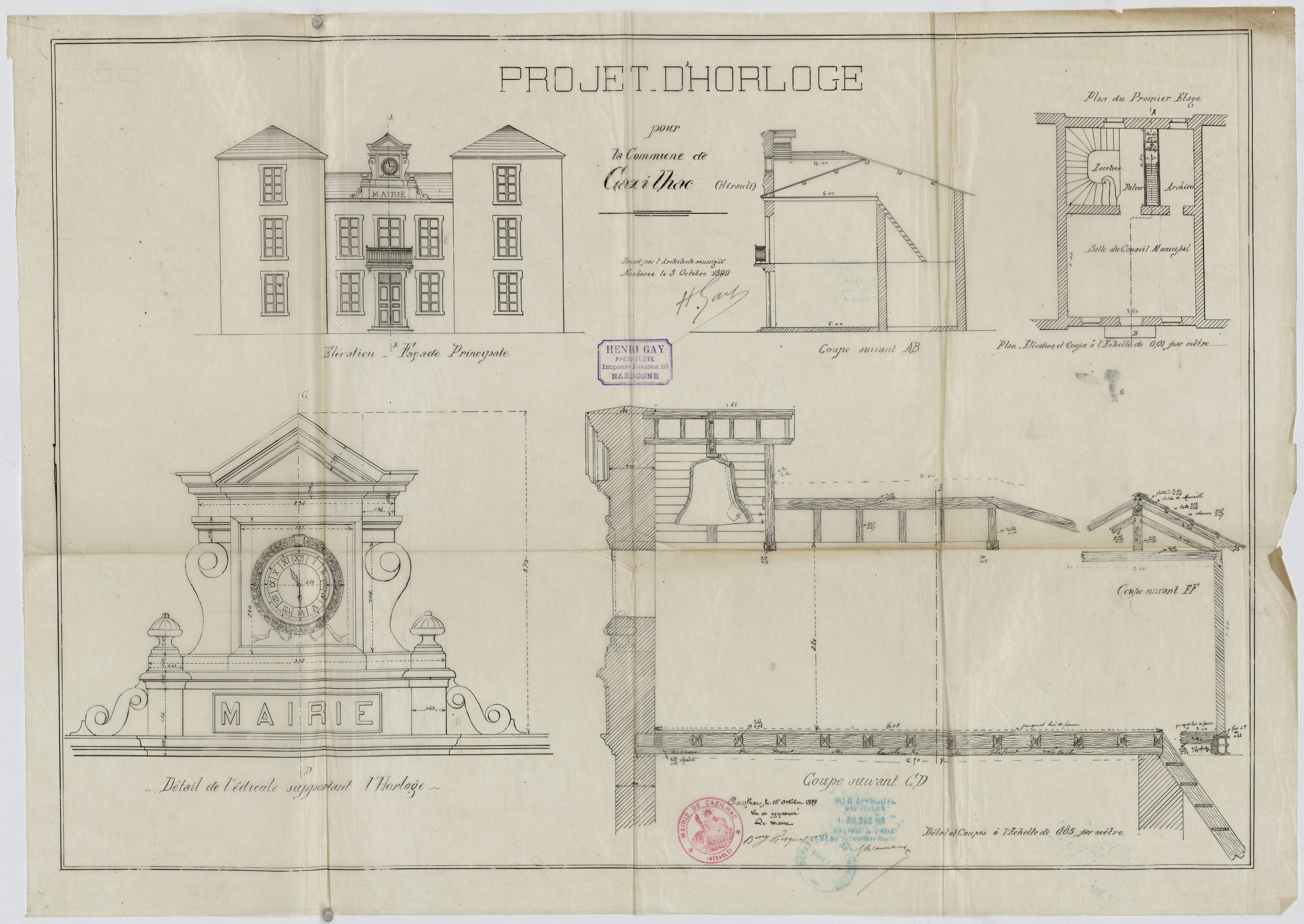 Cazilhac. - Projet d'horloge : élévation de la façade principale, plan du premier étage, détail de l'édicule supportant l'horloge, coupes.